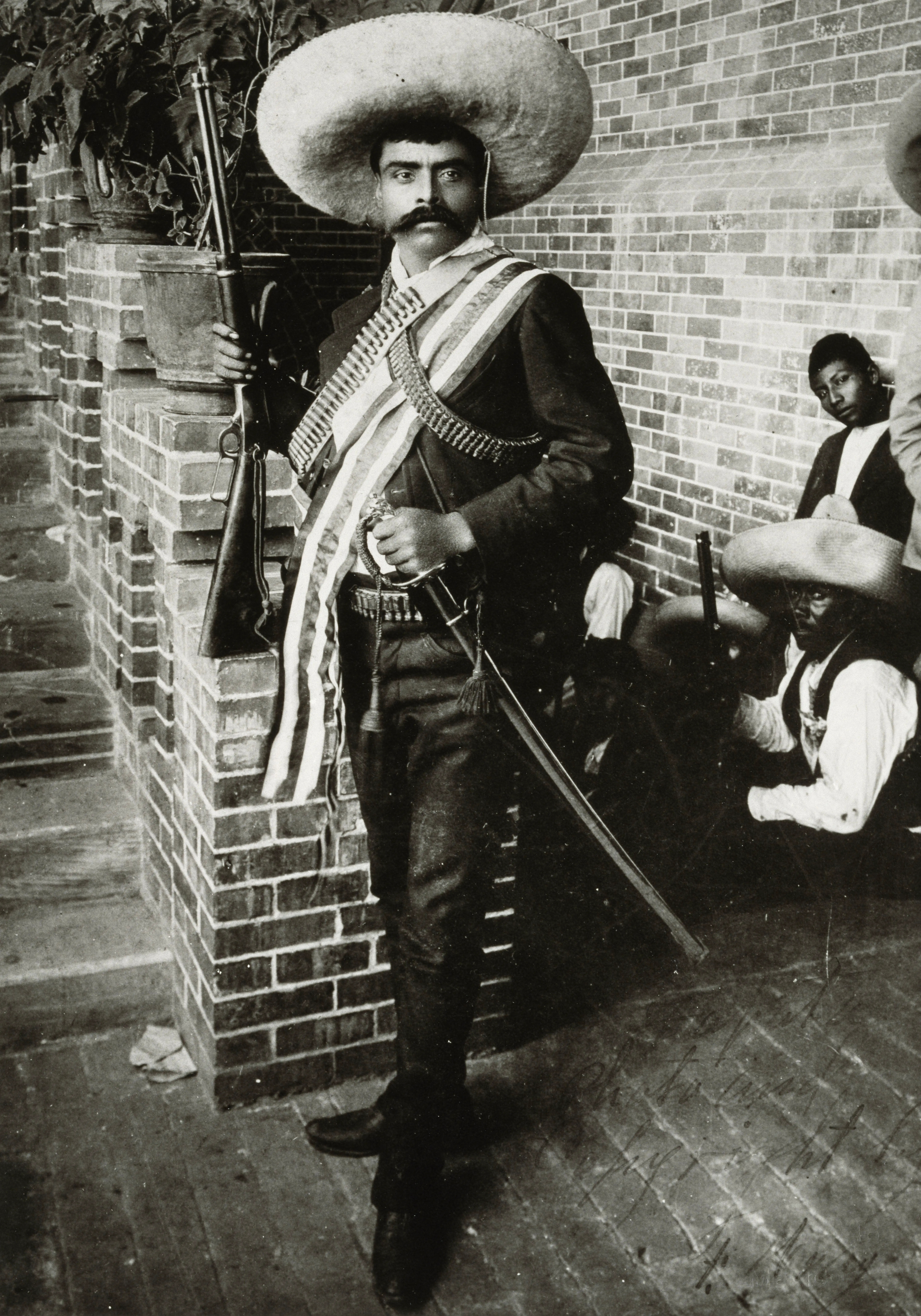 Emiliano Zapata — populist revolutionary of the Mexican Revolution.